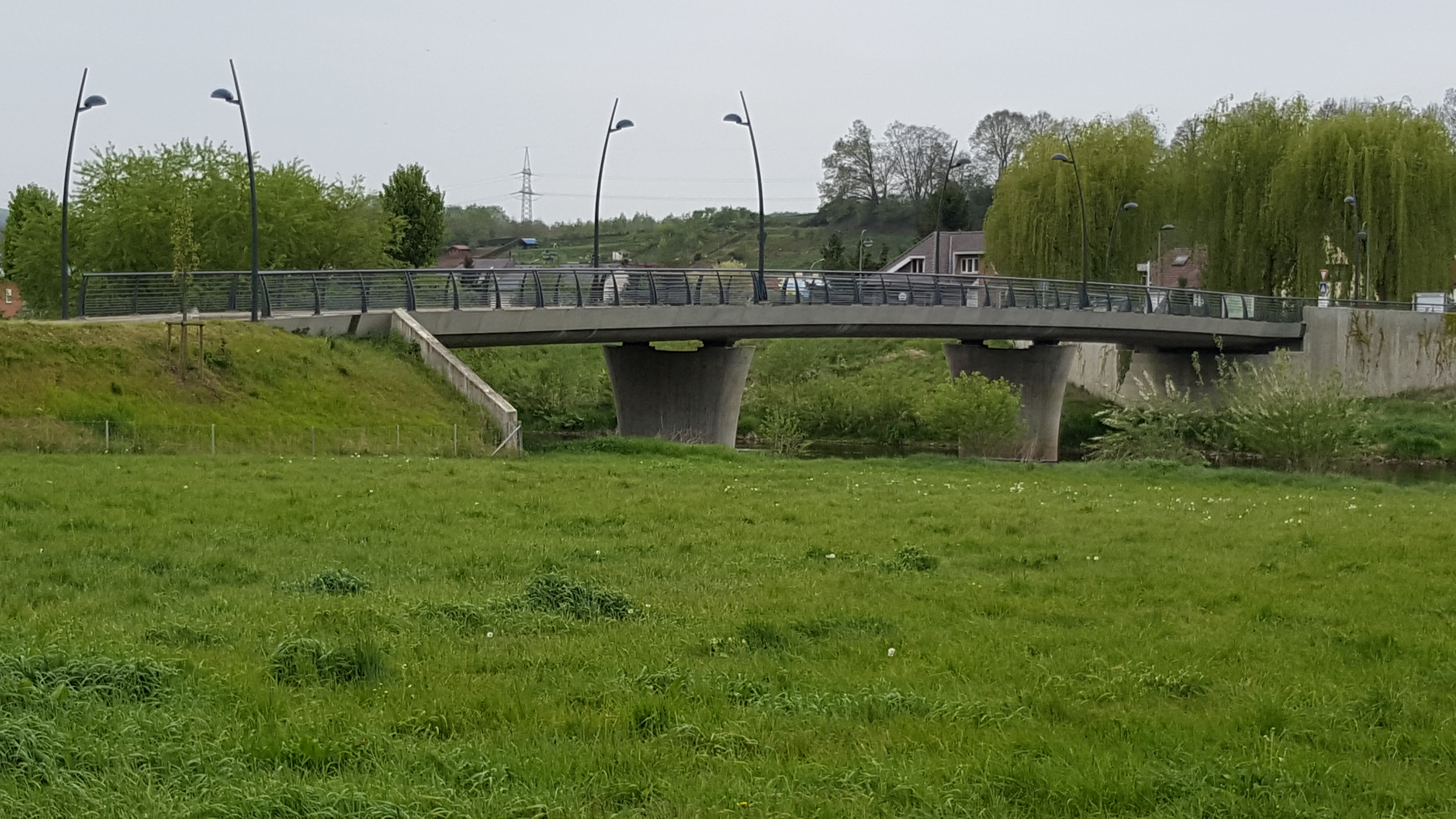 Stroossebréck iwwer d'Sauer zu Angelduerf